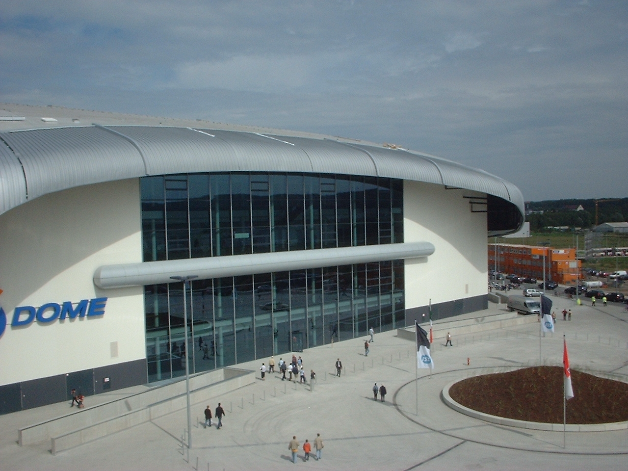 ISS-Dome in Düsseldorf Rath - Eröffnung